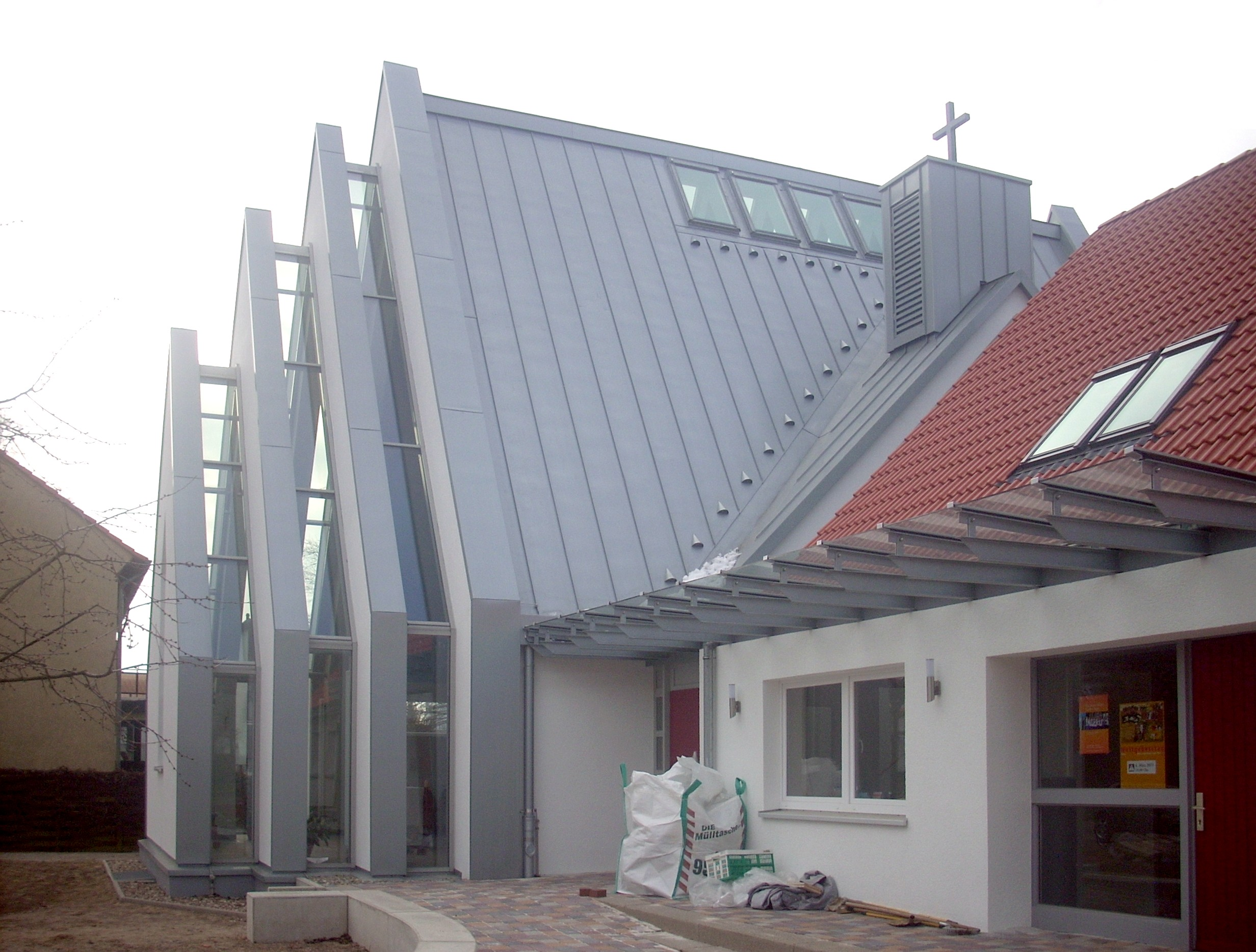 Hannover, Brabeckstraße, Alt-katholische Kirche